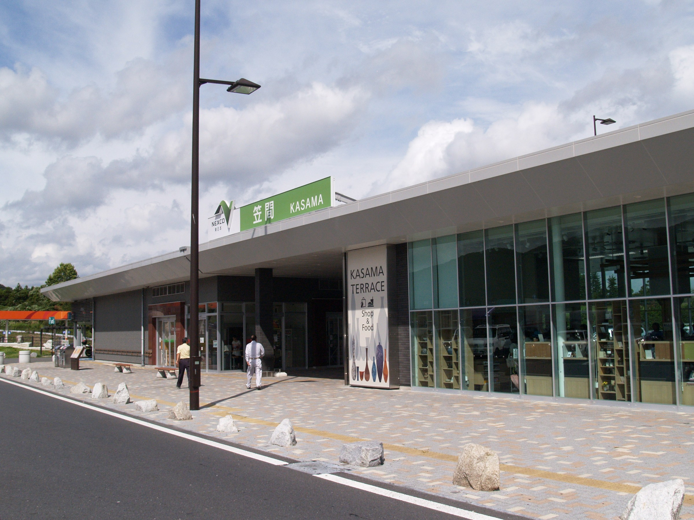 笠間パーキングエリア